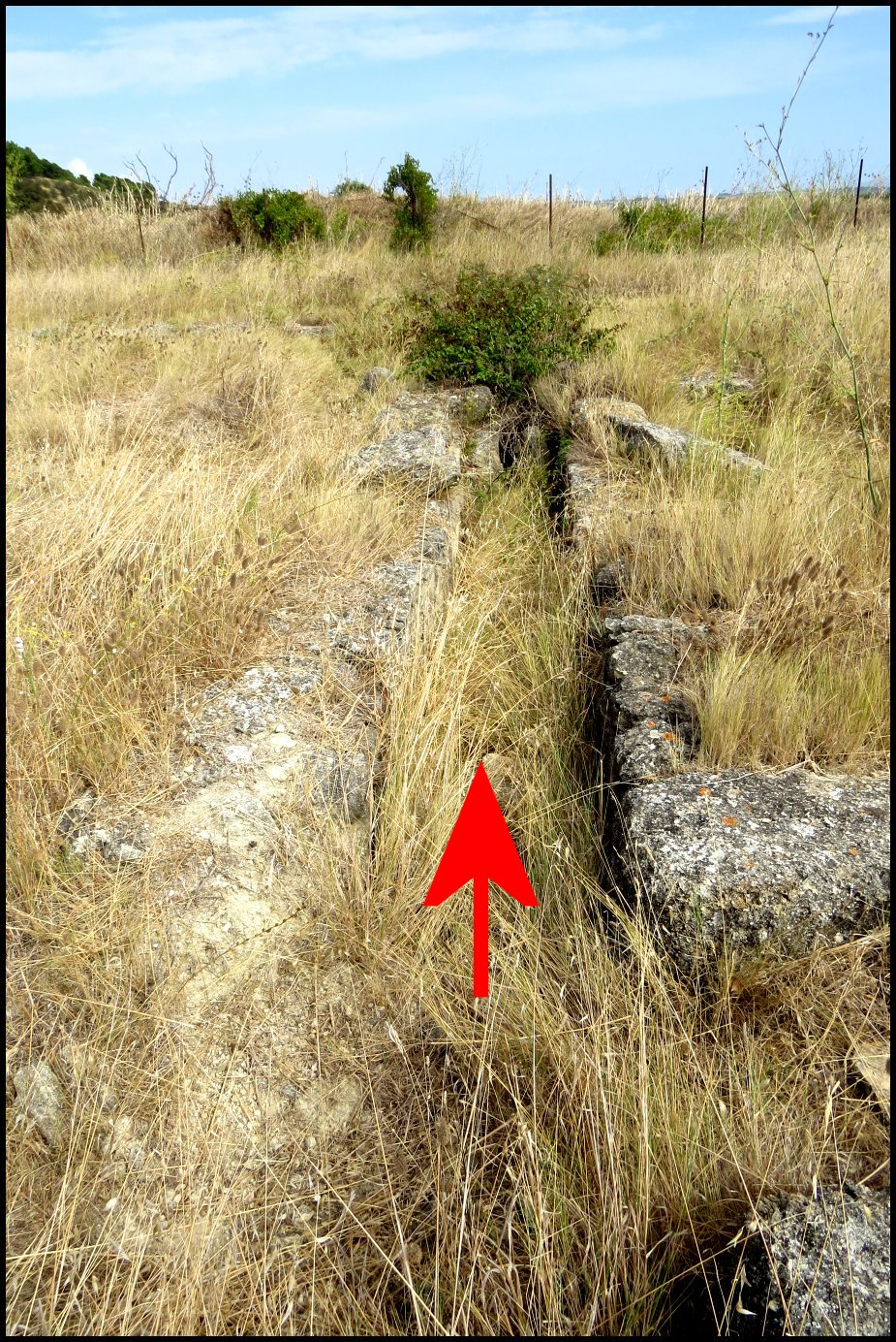 Parois latérales de la canalisation envahie par des graminées. Les dalles de couverture ont disparu. Vue en perspective longitudinale, depuis l'ouest. Flèche : sens de l'écoulement de l'eau